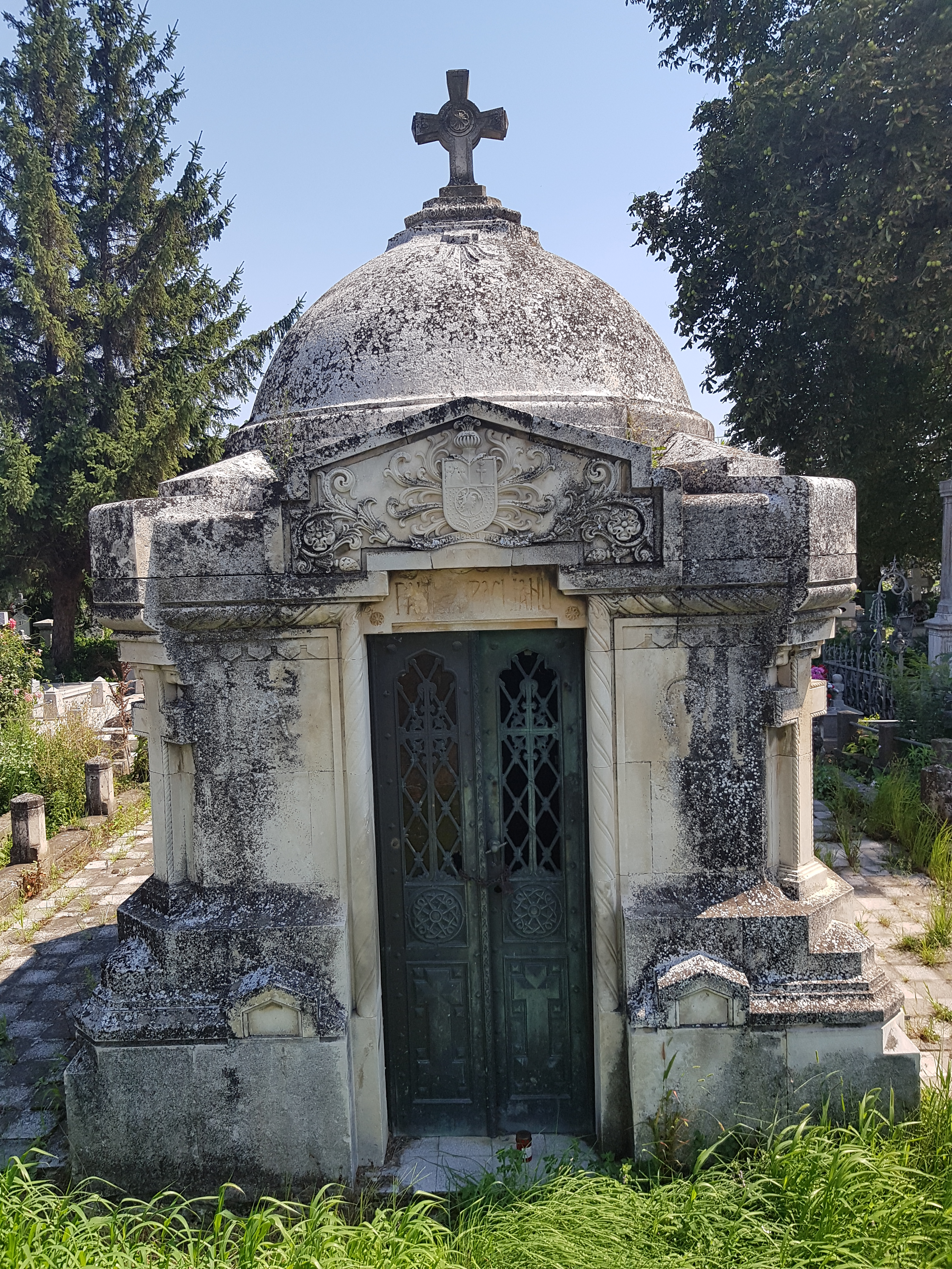 Cavoul Păclianu